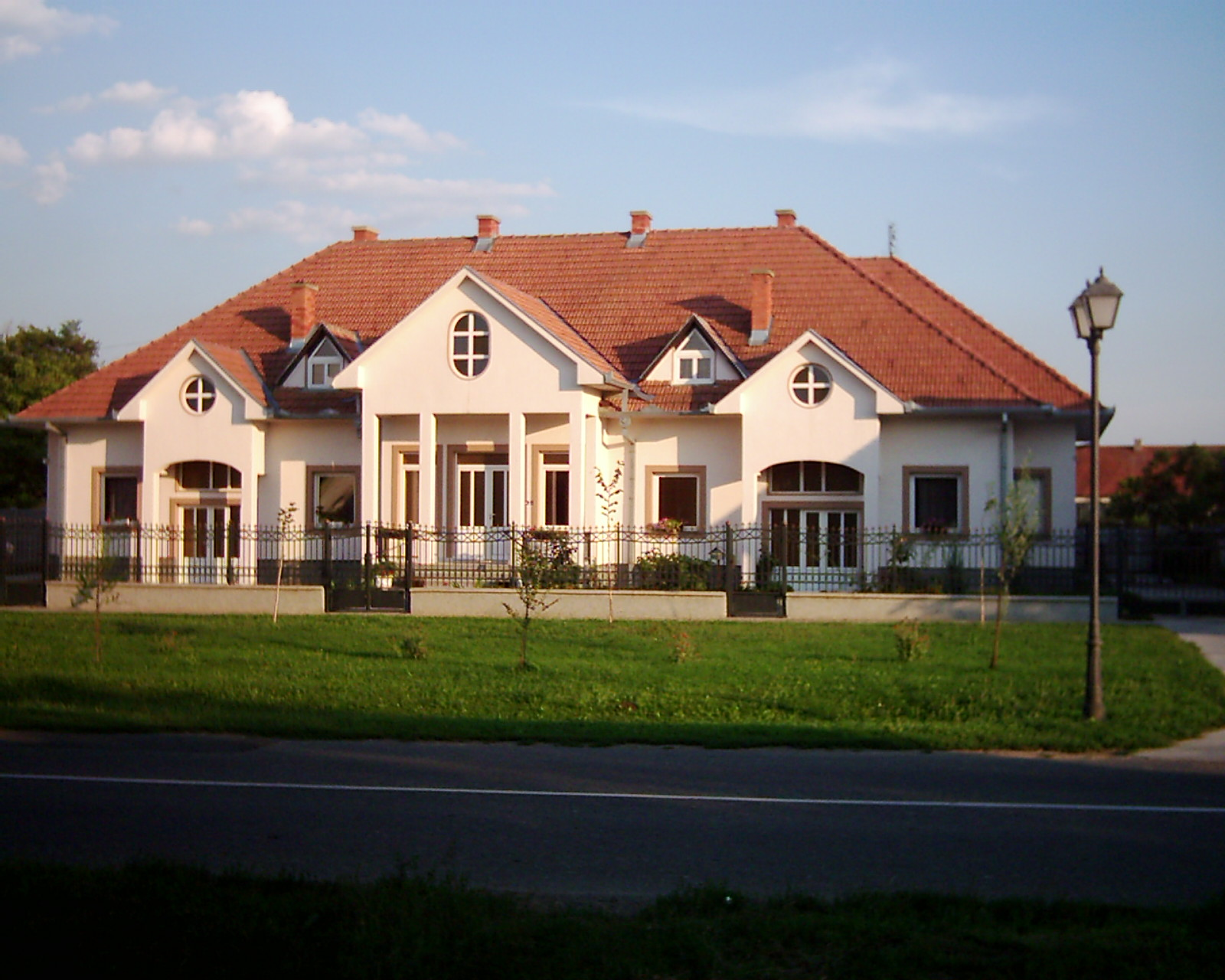 Srpski (latinica): Novazgrada grkokatoličke parohije u ulici Maršala Tita br. 70.